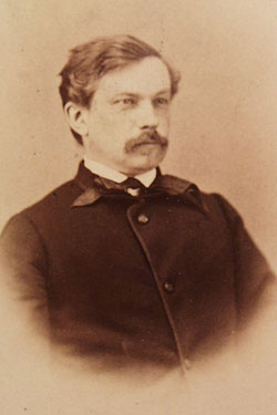 Johann Demel von Elswehr, mayor of Cieszyn